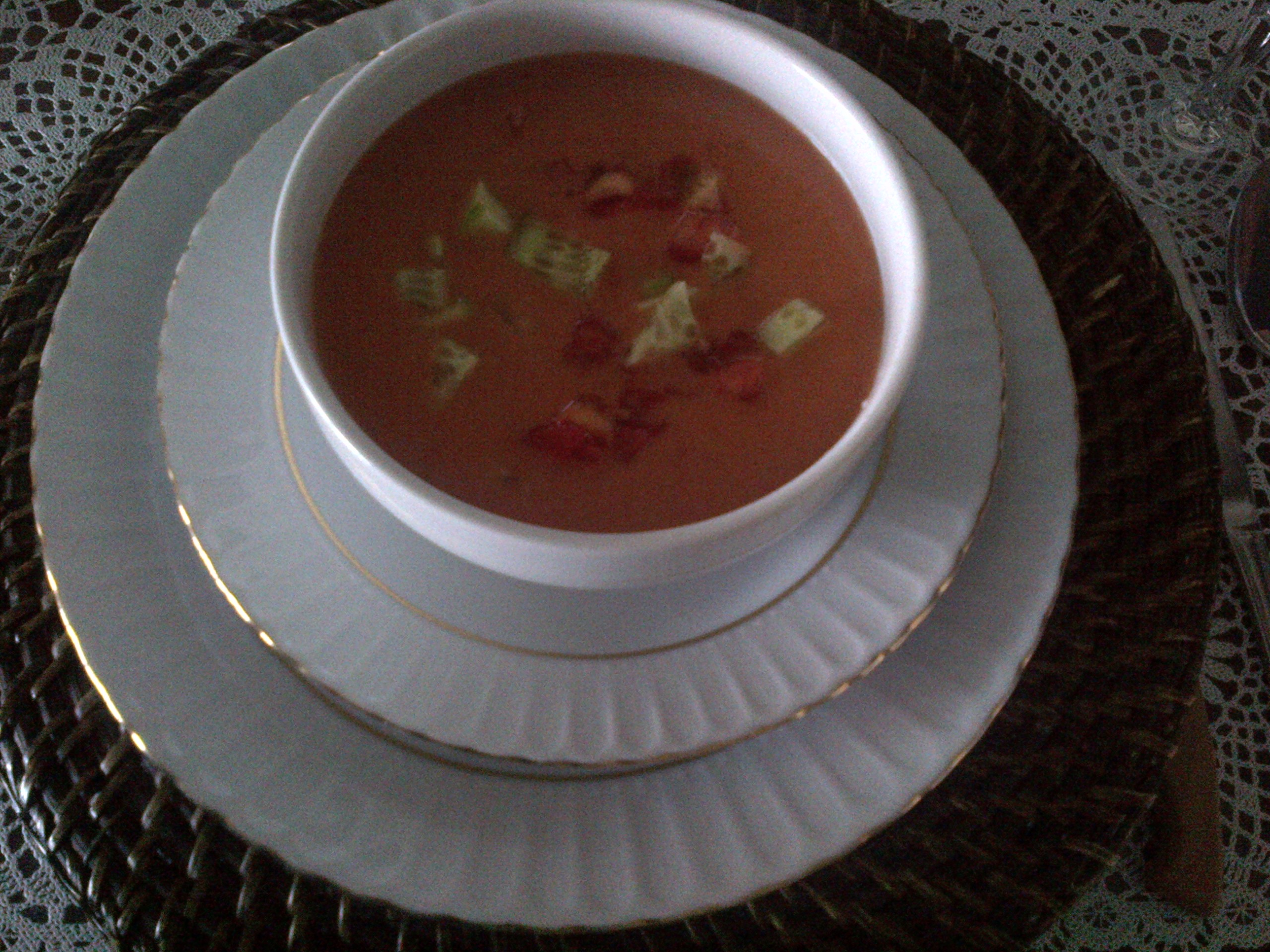 Gazpacho elaborado por un editor de Wikipedia.